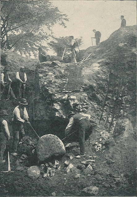 Rester af Københavns volde ryddes omkring år 1900